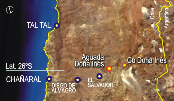 Aguada Doña Inés, Desierto de Atacama, Chile